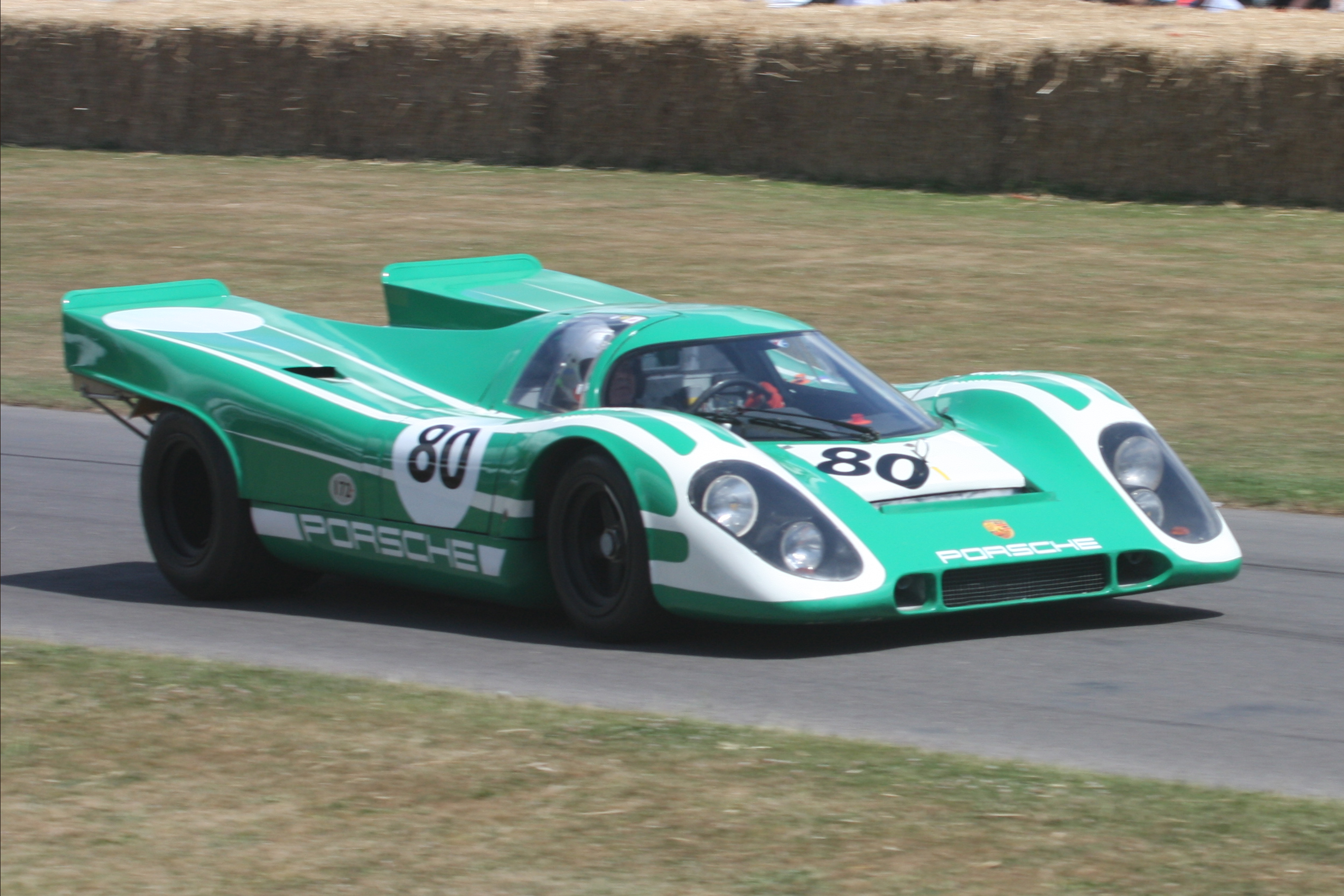 1969 Porsche 917K